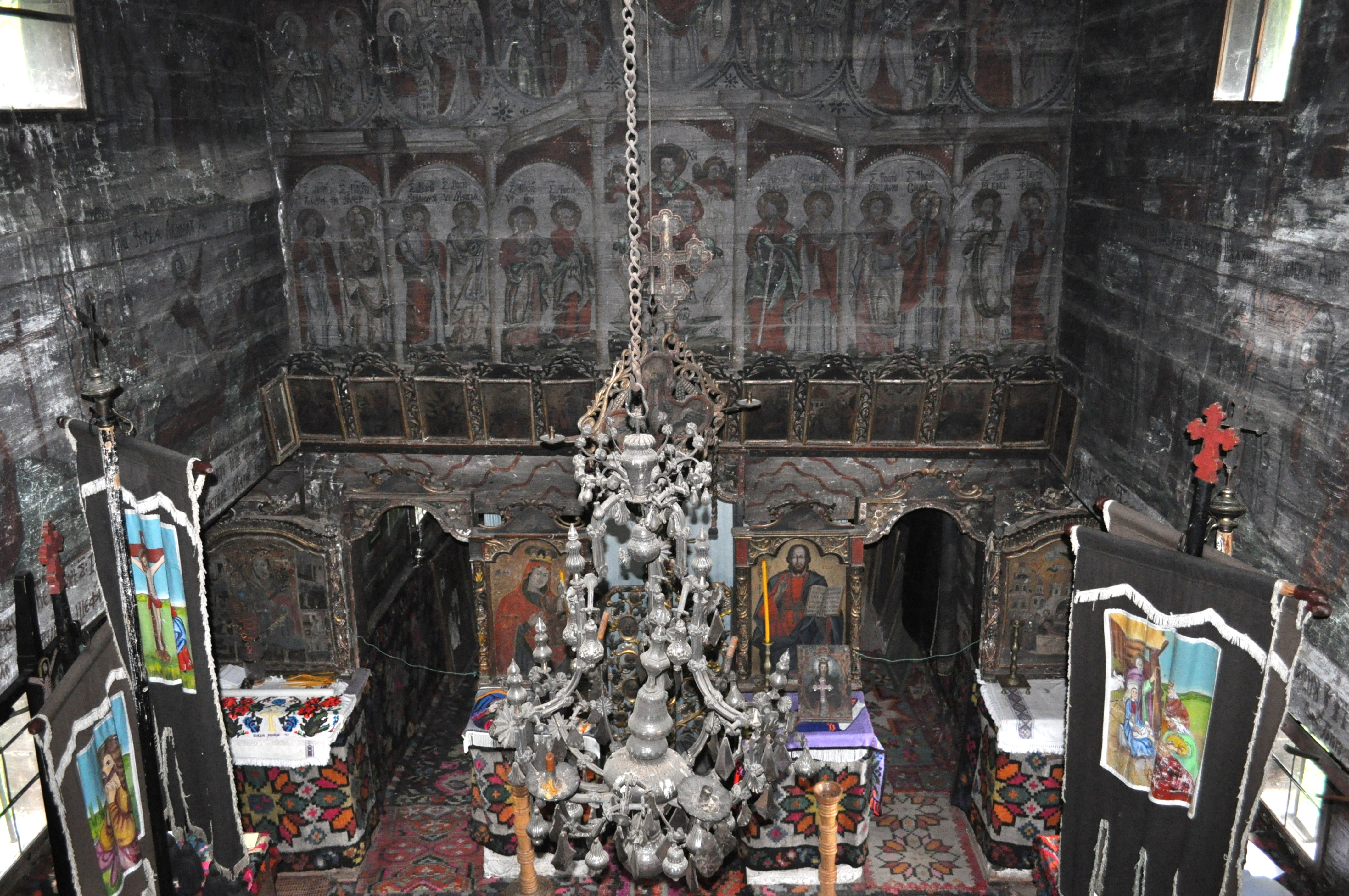 Biserica de lemn "Cuvioasa Paraschiva" , sat POIENILE IZEI; iconostasul văzut din corul bisericii